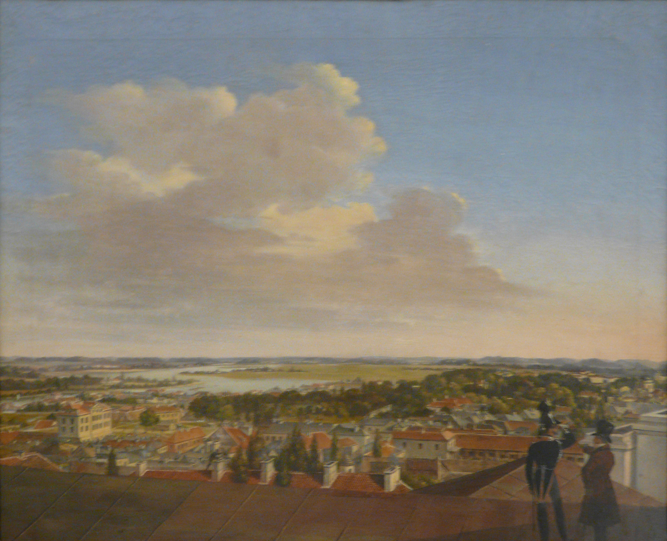 Widok Warszawy z domu Warszawskiego Towarszystwa Przyjaciół Nauk. Ok. 1825